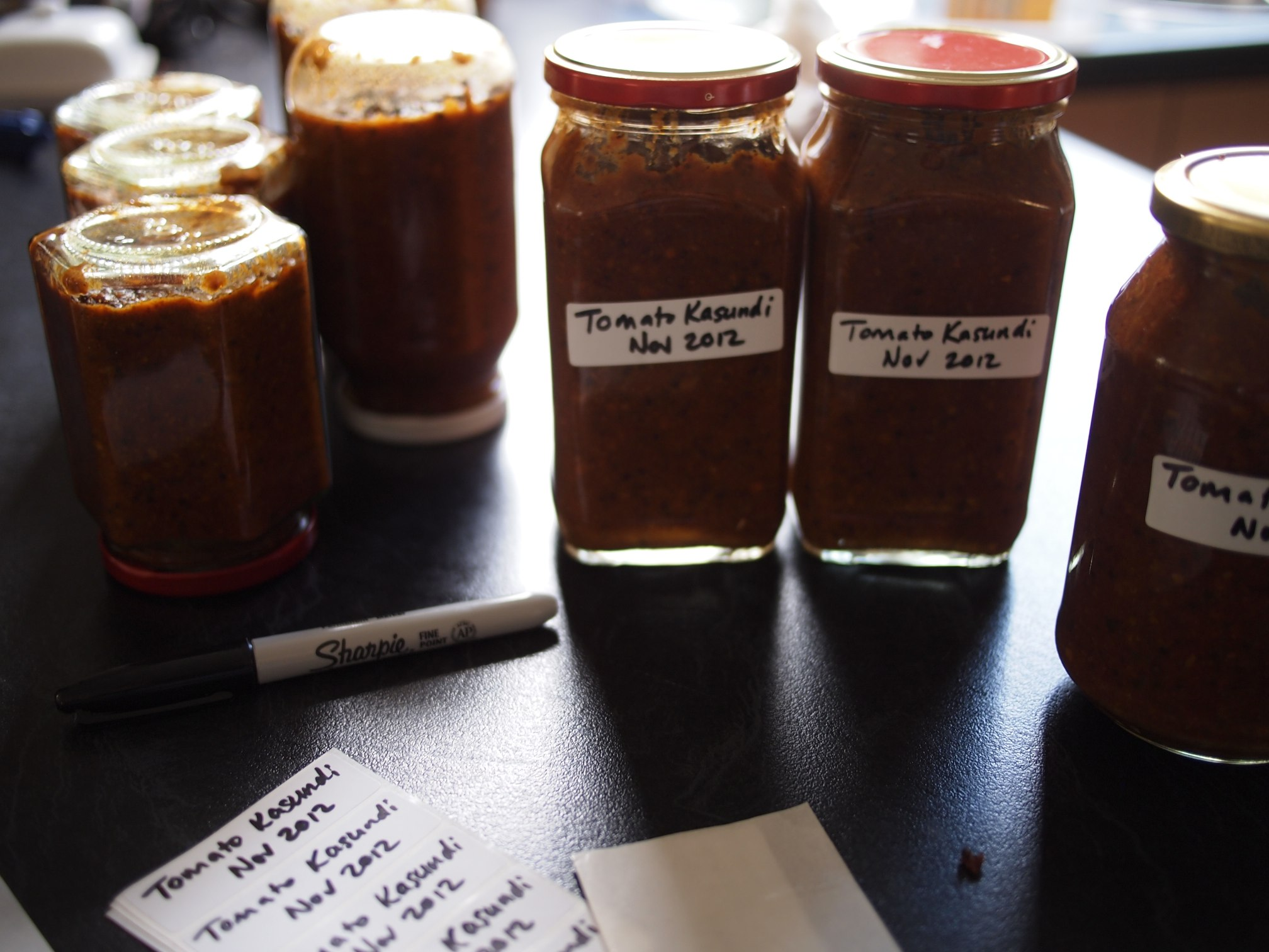 Tomato kasundi